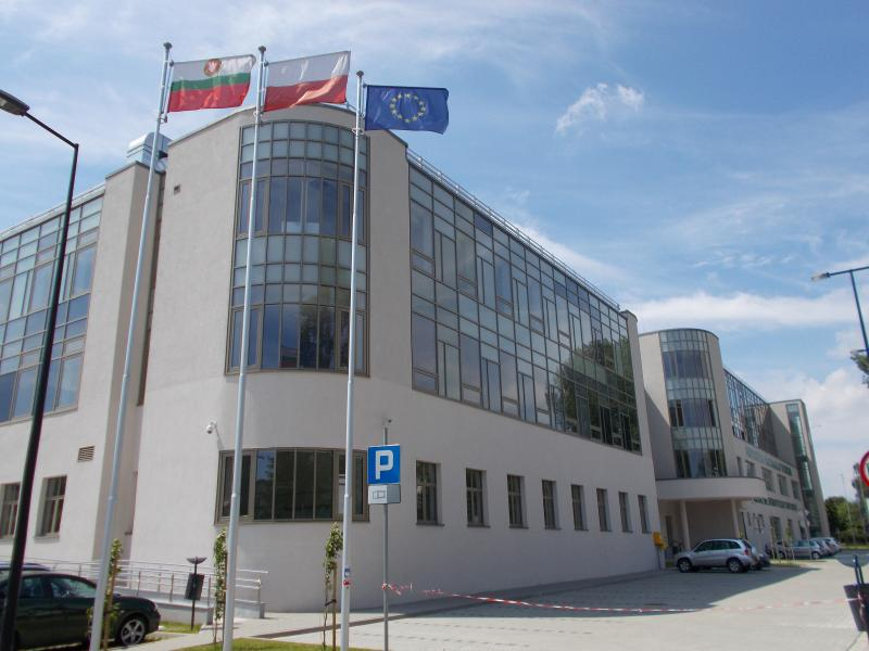 Budynek Innowacyjnego Centrum Patologii i Terapii Zwierząt - Wydz. Weterynarii